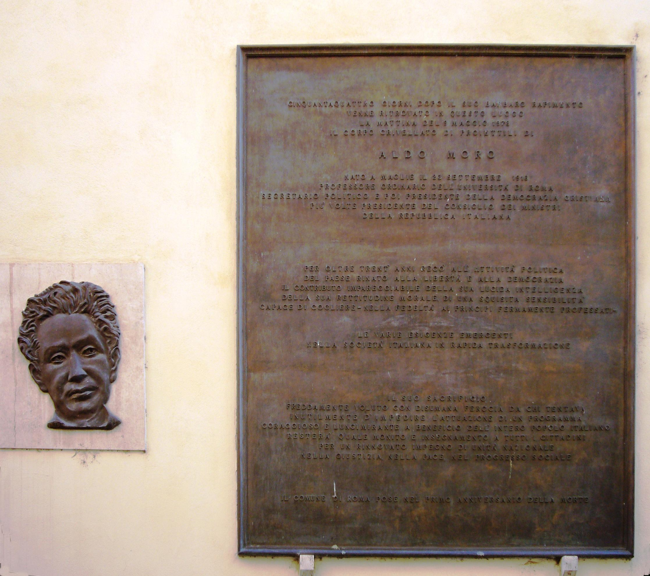 Roma, via Caetani: memoria di Aldo Moro nel luogo del ritrovamento del corpo il 9 maggio 1978. Lapide del Comune di Roma del 9 maggio 1979.